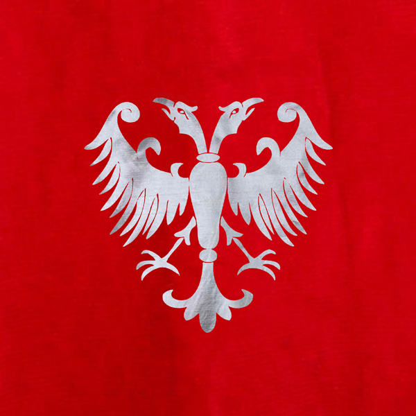 Опис слике: Царска застава Стефана Уроша IV Душана Немањића (1308-1355), цара Србије (владао: 1345-1355)